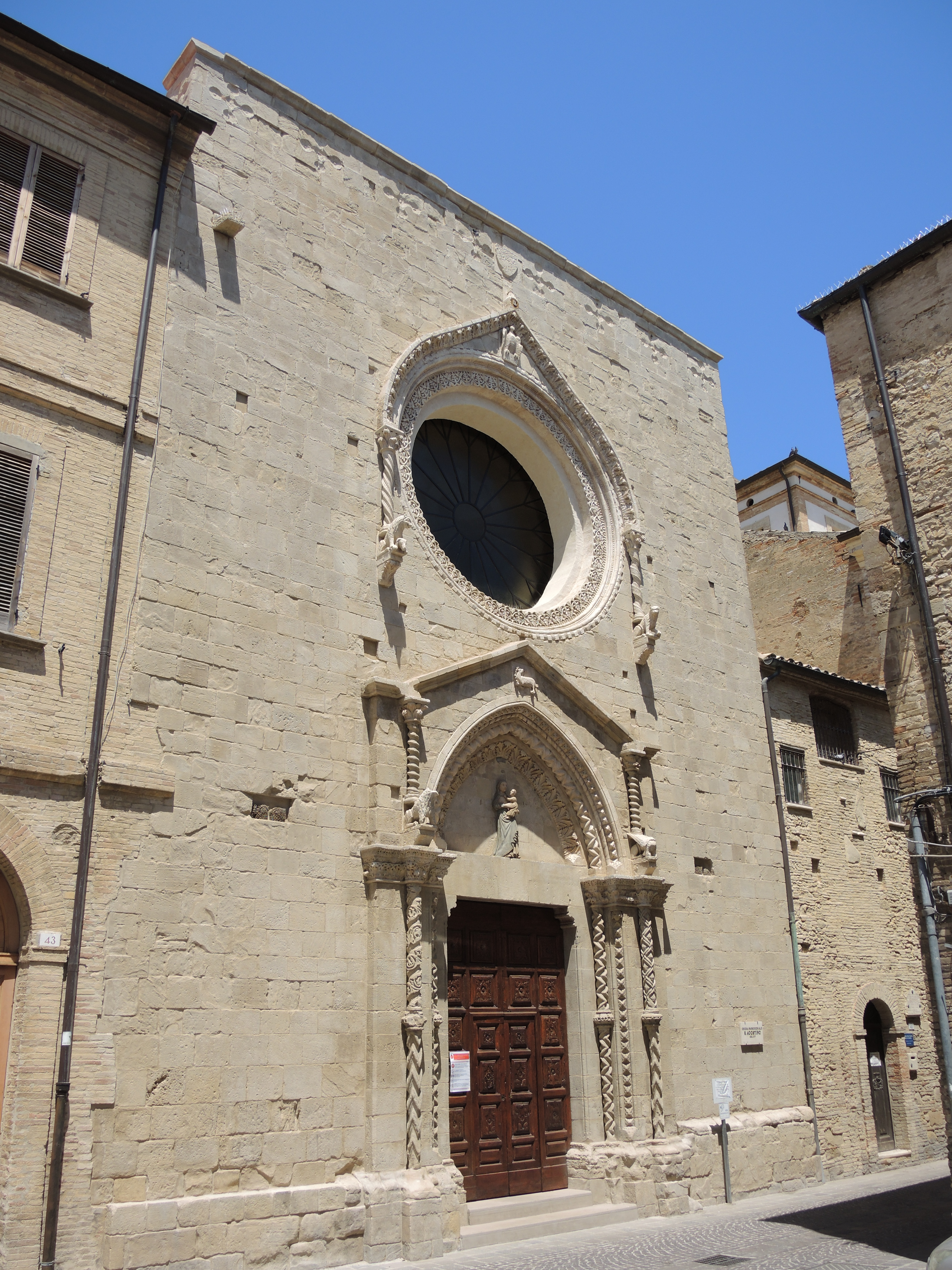 Lanciano - Chiesa di Sant'Agostino